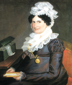 Portrait de Rosalie Papineau Dessaules